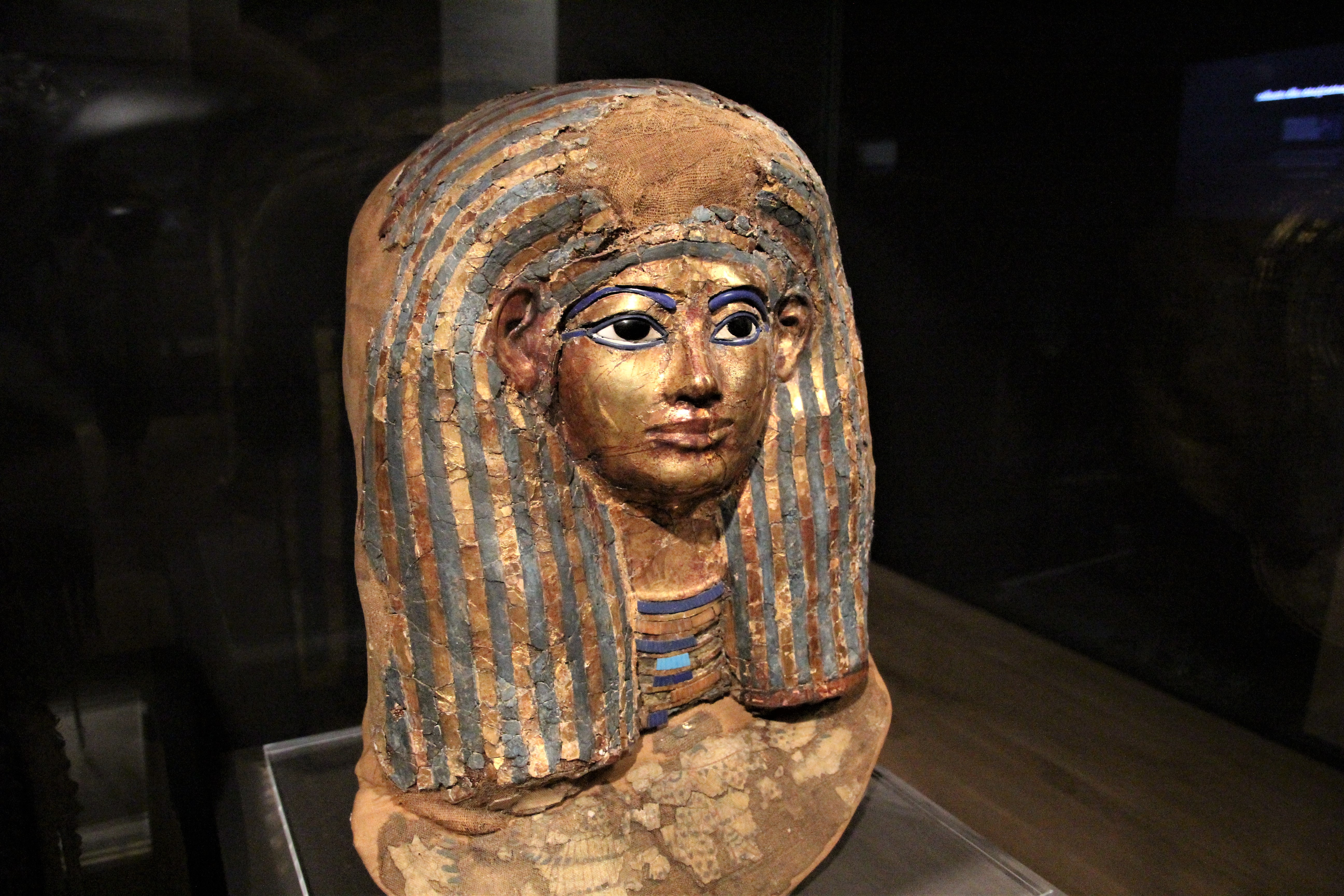 Torino, Museo egizio